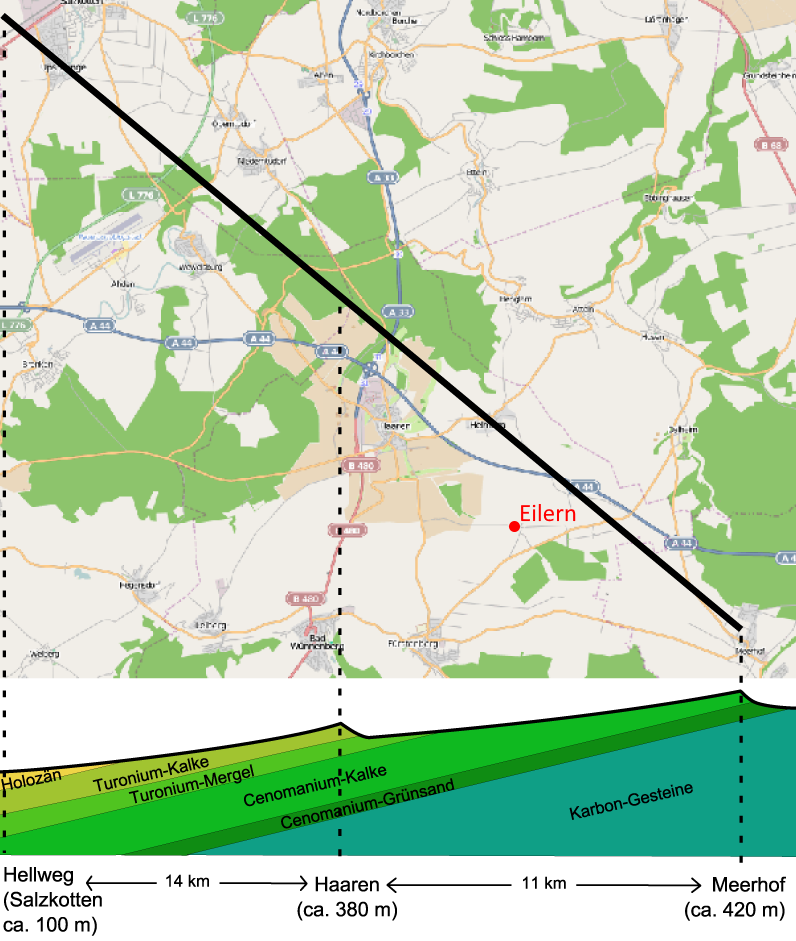 geologischer Aufbau des Sintfelds